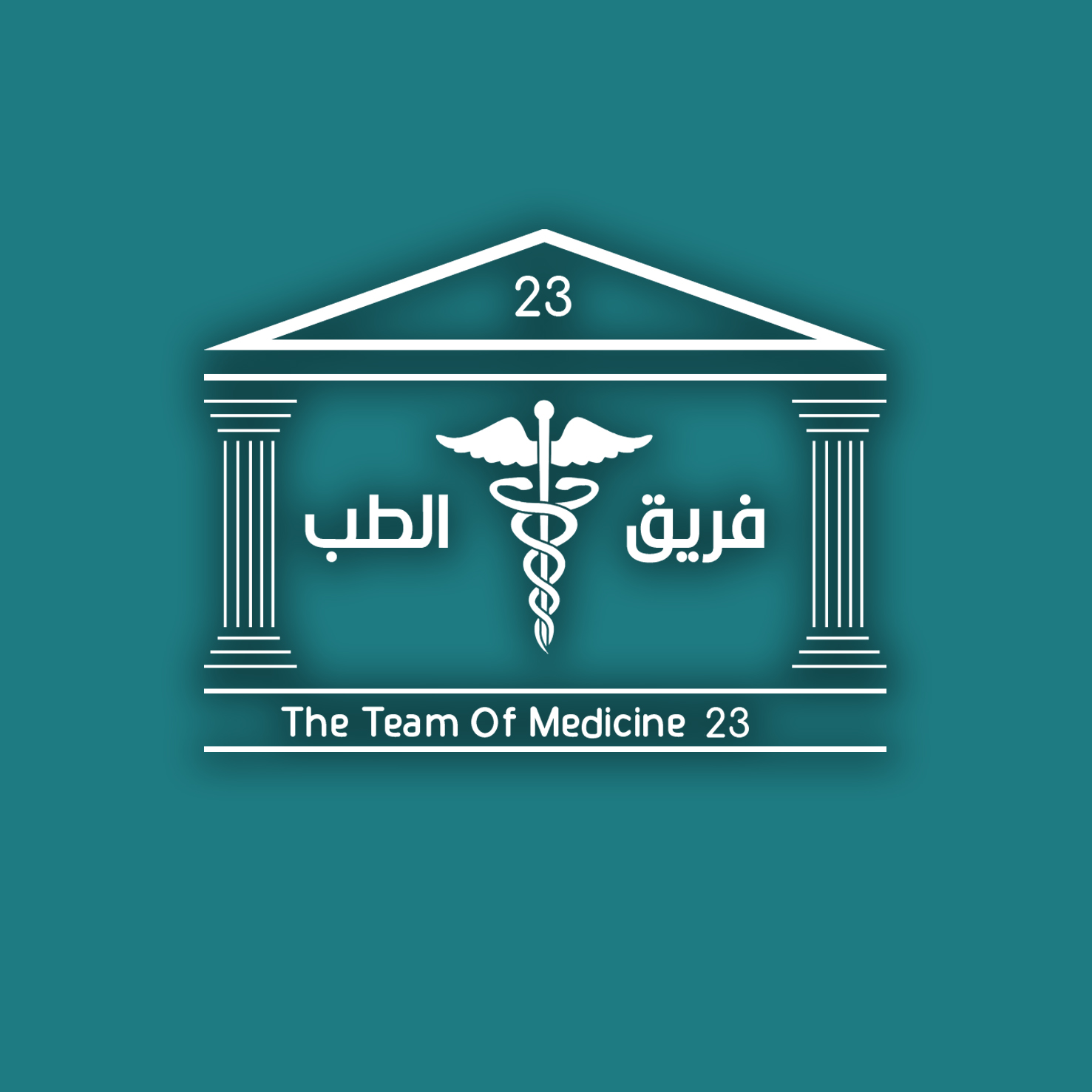 شعار فريق الطب_23 المستوحى من التصميم العمراني لكلية الطب البشري بجامعة البعث